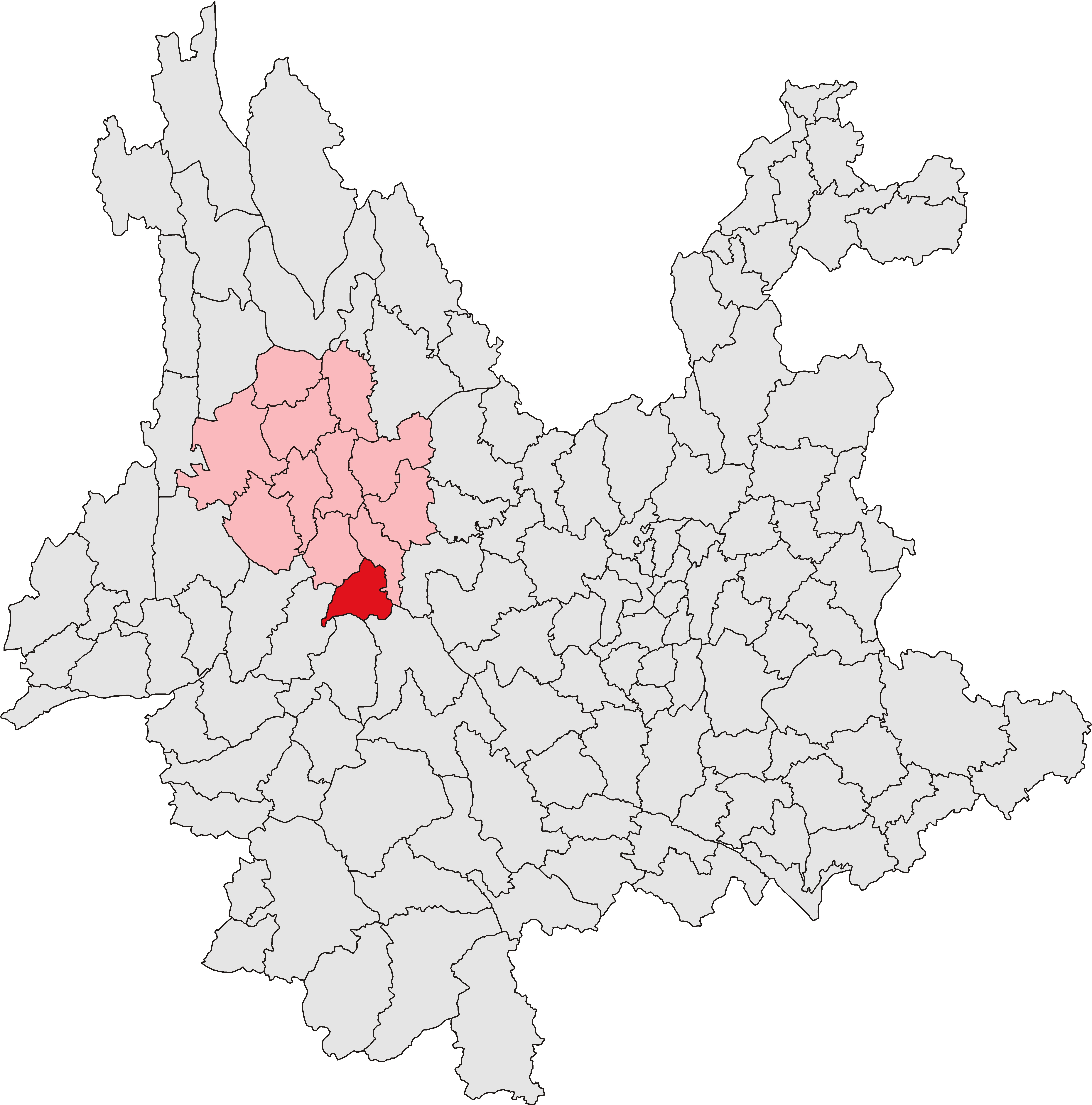 中文（中国大陆）: 南涧彝族自治县位置图